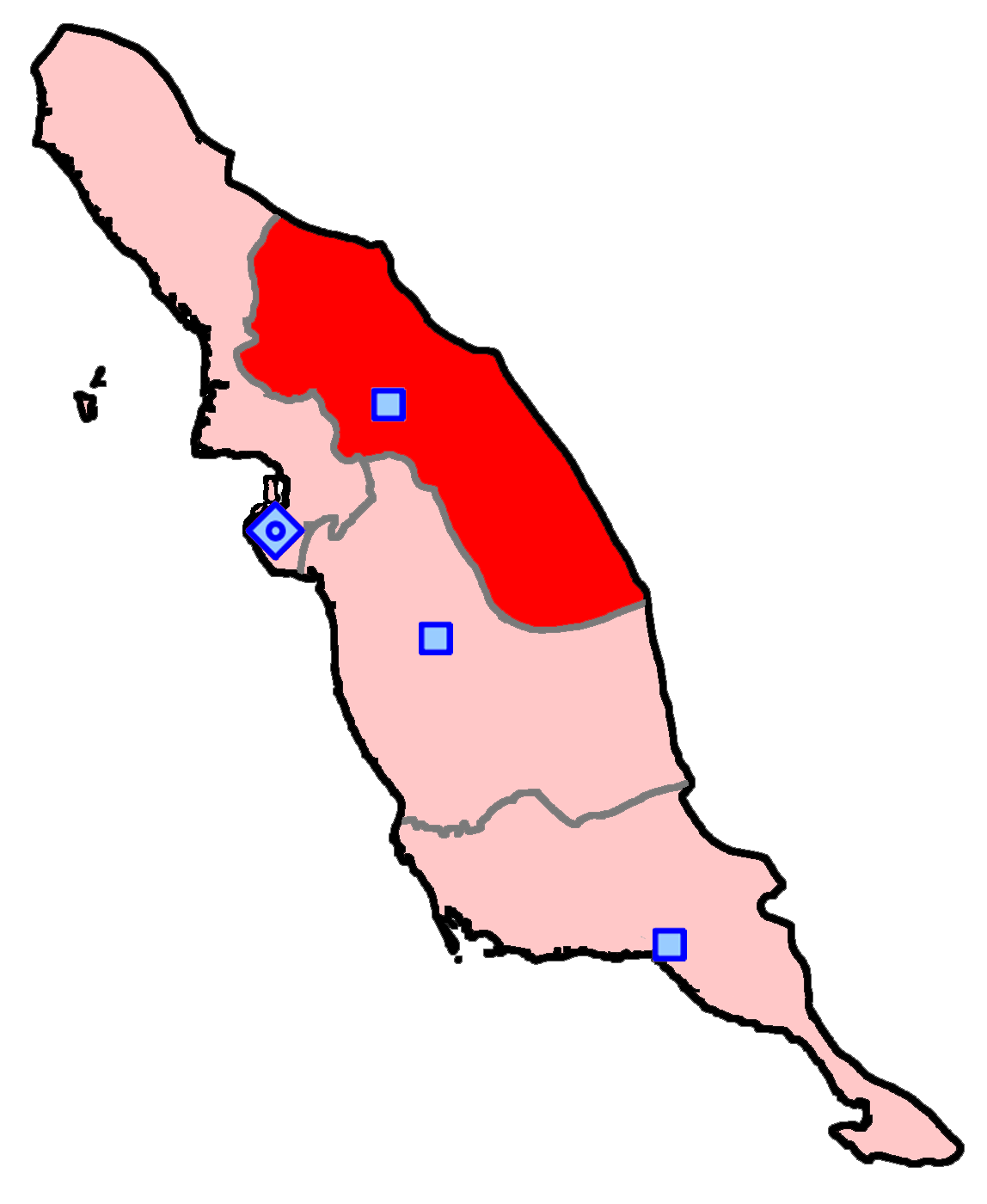 حوزهٔ انتخاباتی دشتستان برای انتخابات مجلس شورای اسلامی